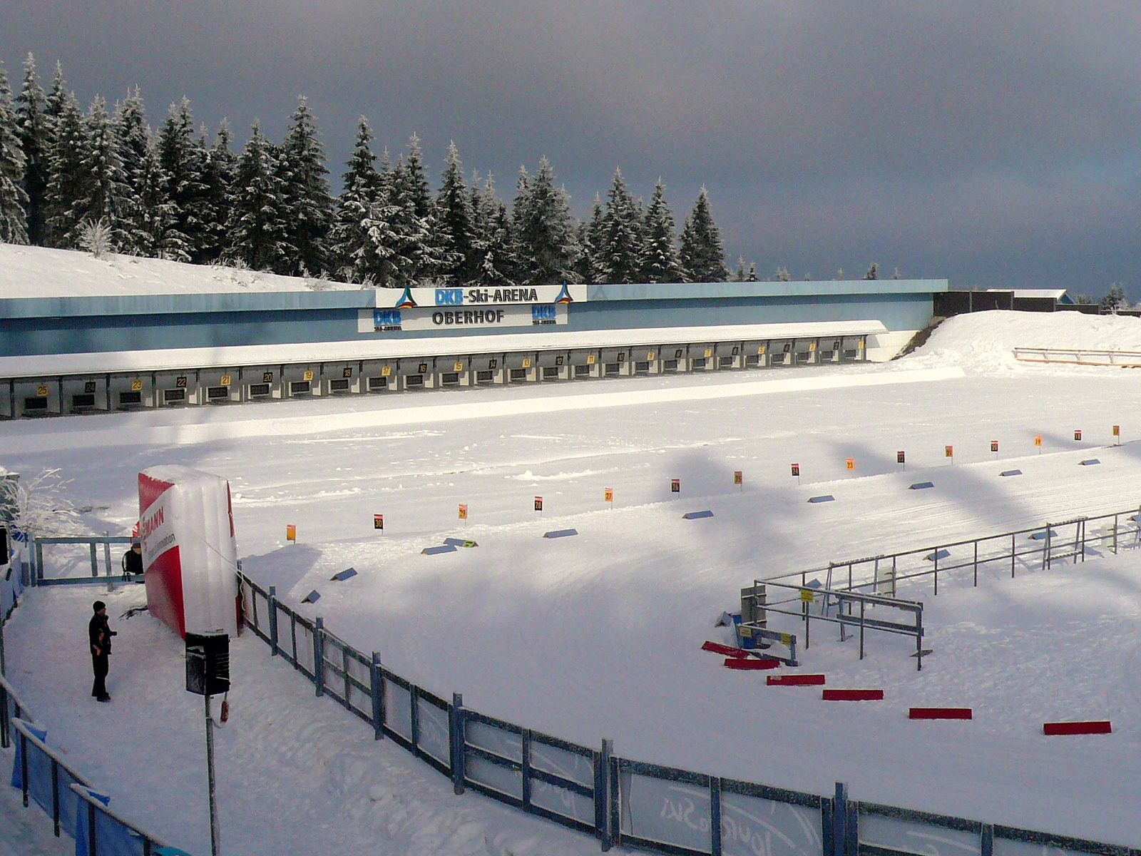 DKB-Ski Arena Oberhof.